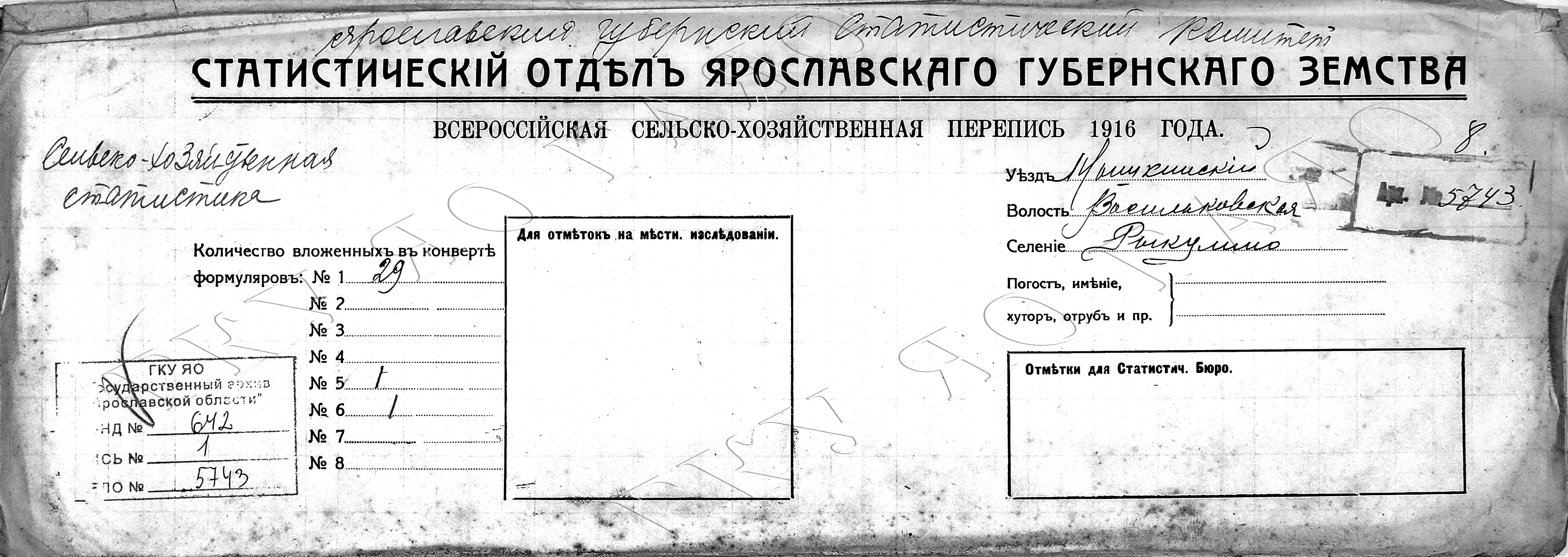 Подворные карточки обследования крестьянских хозяйств деревни Рыкулино Васильковской волости, выполненные при Всероссийской сельско-хозяйственной переписи 1916 года.